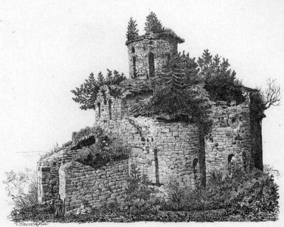 1-я древне-христианская церковь, находящ. в Зеденчукском ущелии. Вид с юго-восточ. стор.